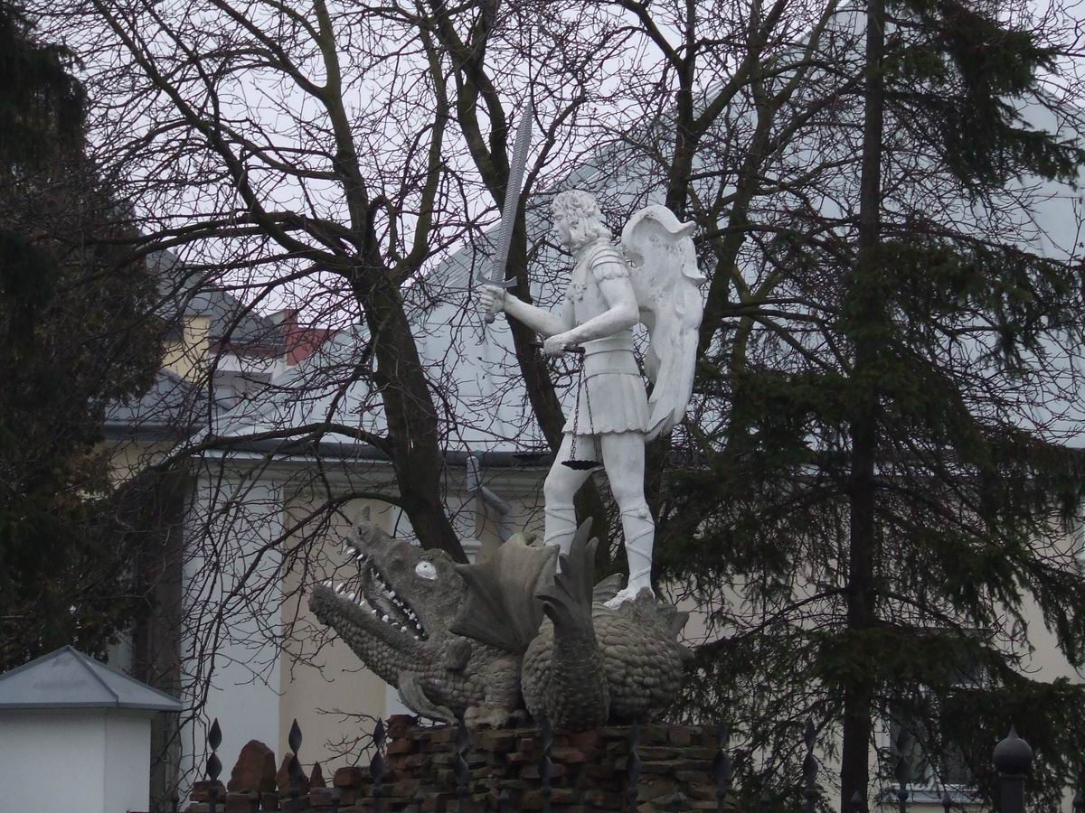 Biała Podlaska, Michał Archanioł stojący na smoku.